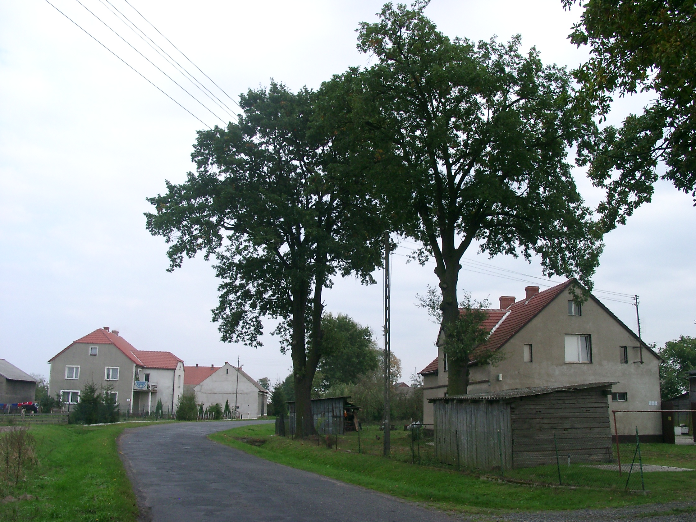 Zamienice koło Chojnowa Zamienice near Chojnów